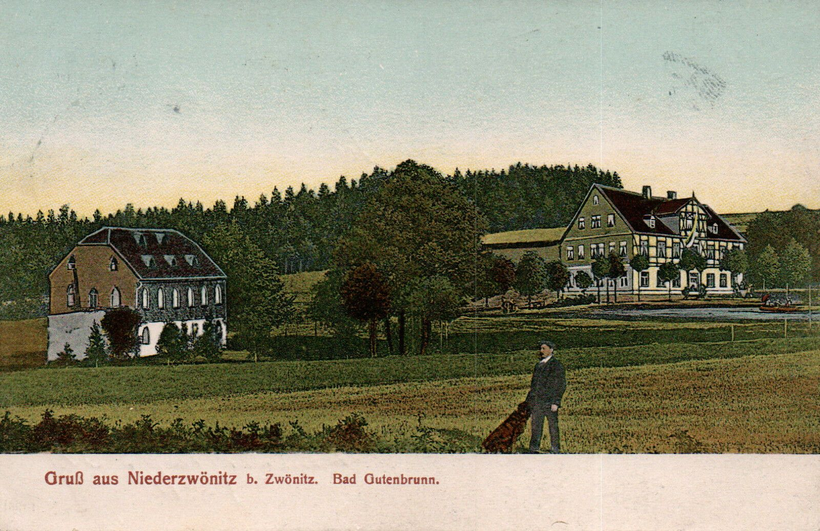 Niederzwönitz: Wahrscheinlich schon im 19. Jahrhundert, wenn nicht schon früher, gab es in Niederzwönitz auf einer Höhe von 600 Metern das Bad Gutenbrunn mit einem Badehaus. Es wurde auch Bad „Guter Brunnen“ genannt und auf Ansichtskarten bis in die Mitte des 20. Jahrhunderts mit „Mineral- und Radiumbad, idyllischer Aufenthalt für Erholungsbedürftige. Gern besuchter Ausflugsort“ beworben.